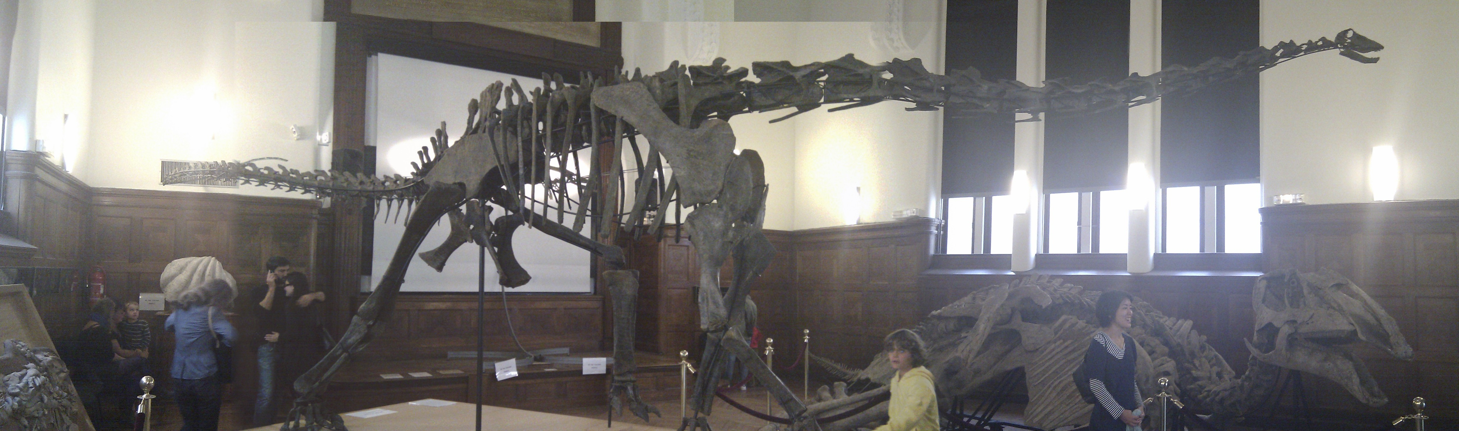 "Un impressionnant Suuwassae Emiliae de 11 mètres, espèce de diplodocus herbivore à long cou, qui a vécu à la fin du jurassique (-147 millions d’années environ) et dont on ne connait que deux spécimens dans le monde. Ce squelette, découvert aux Etats Unis en 2009, est le spécimen le plus complet connu, permettant de répondre aux questions des scientifiques restées en suspens par manque de fossiles." (extrait du dossier de presse de l'exposition)